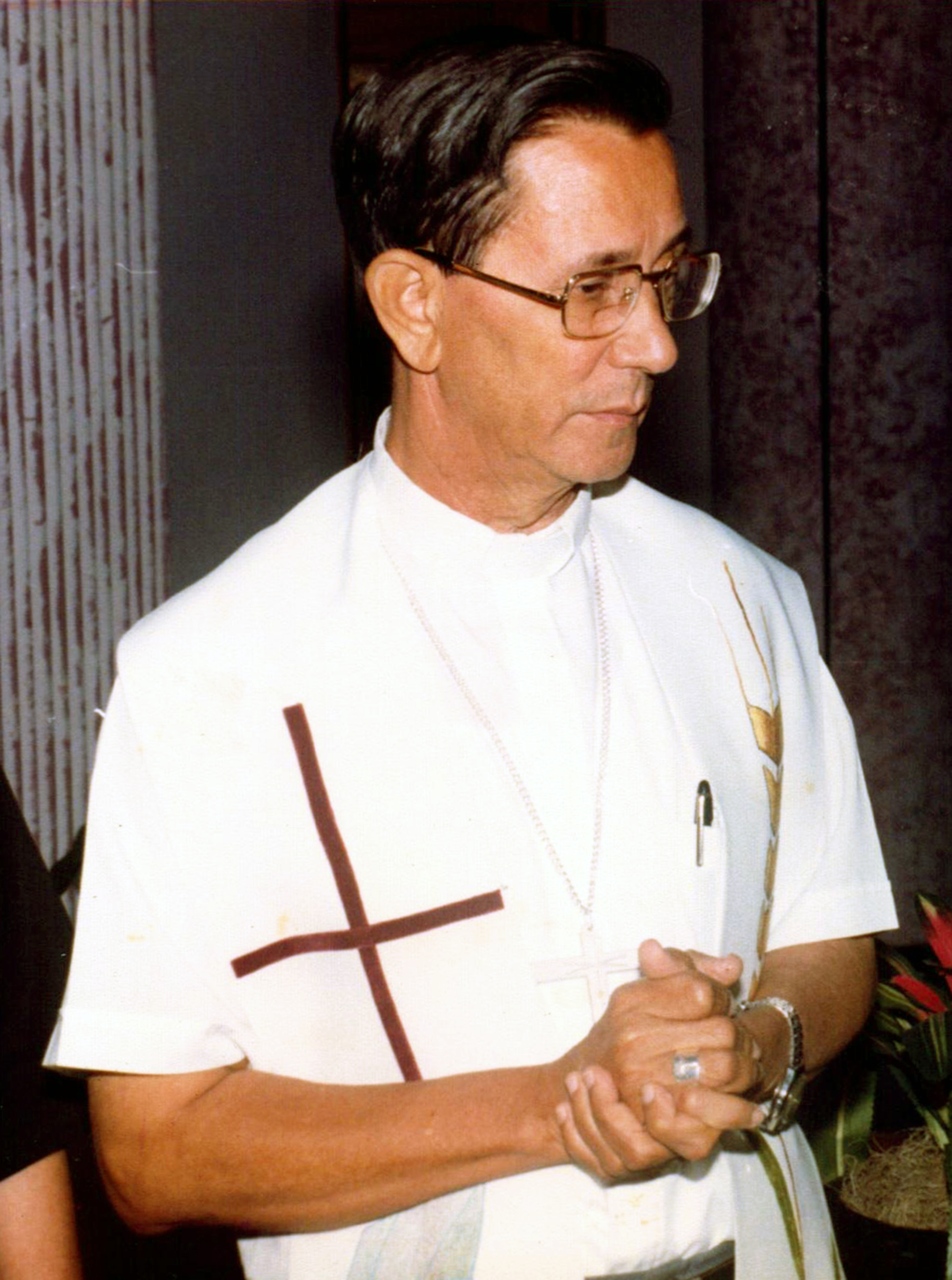 Mons. Fabio Mamerto Rivas Santos. Obispo Emérito de Barahona